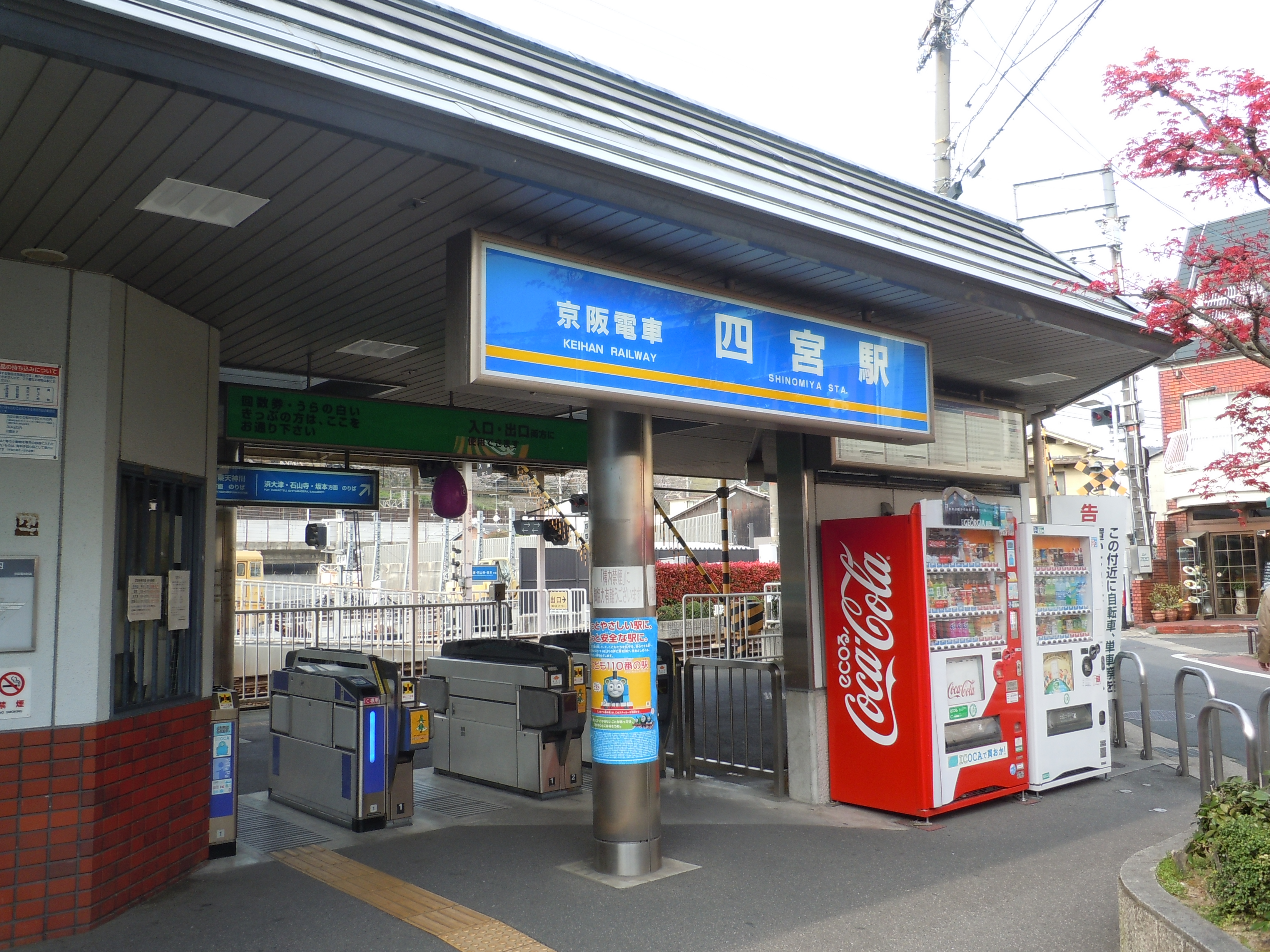 四宮駅。山科区にて。